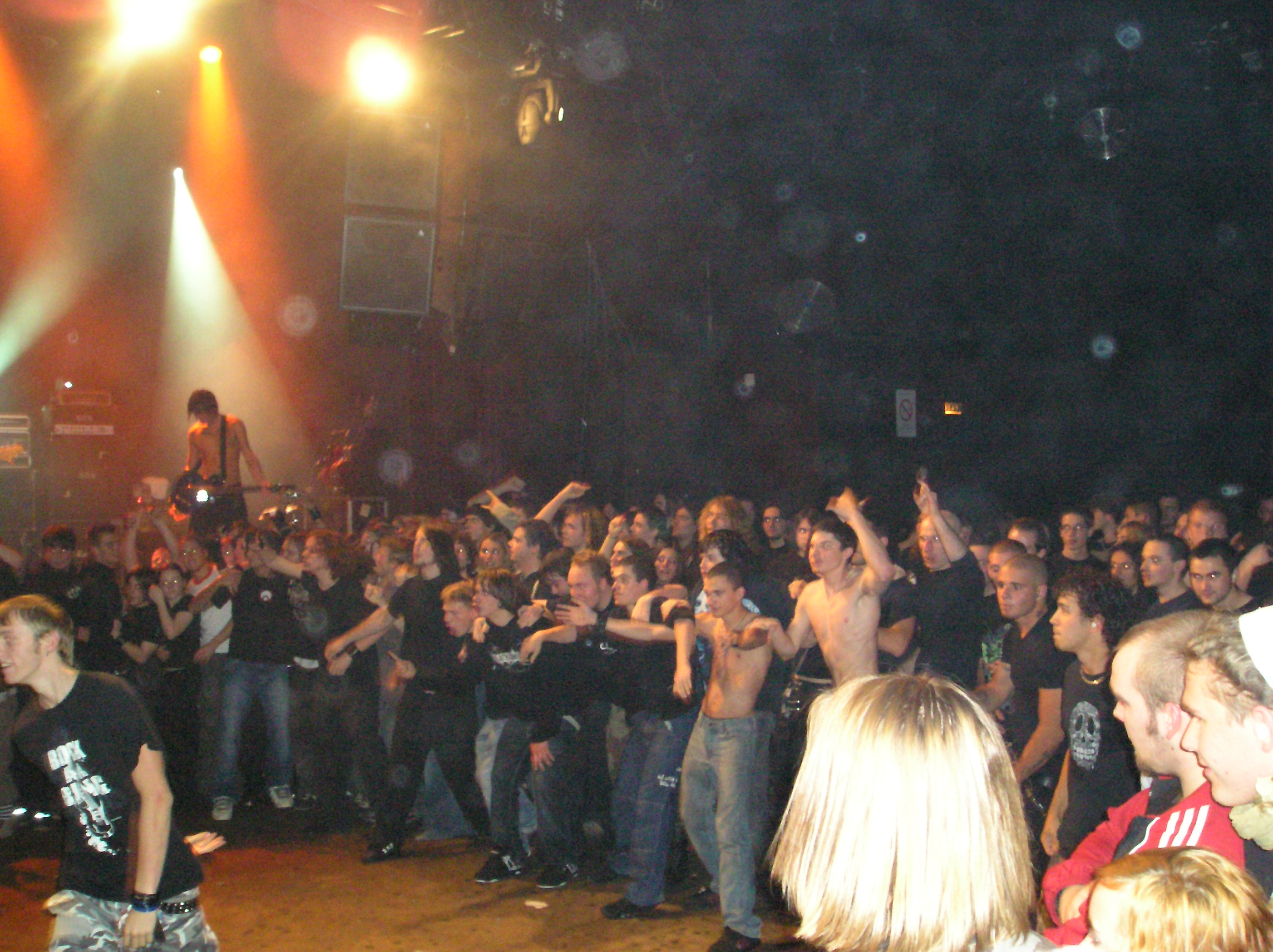 Préparation d'un braveheart au concert de Watcha à la Laiterie de Strasbourg